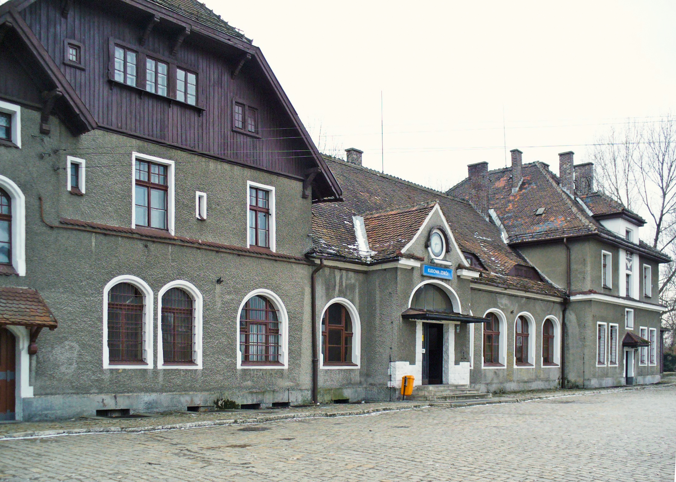 Stacja kolejowa Kudowa-Zdrój.